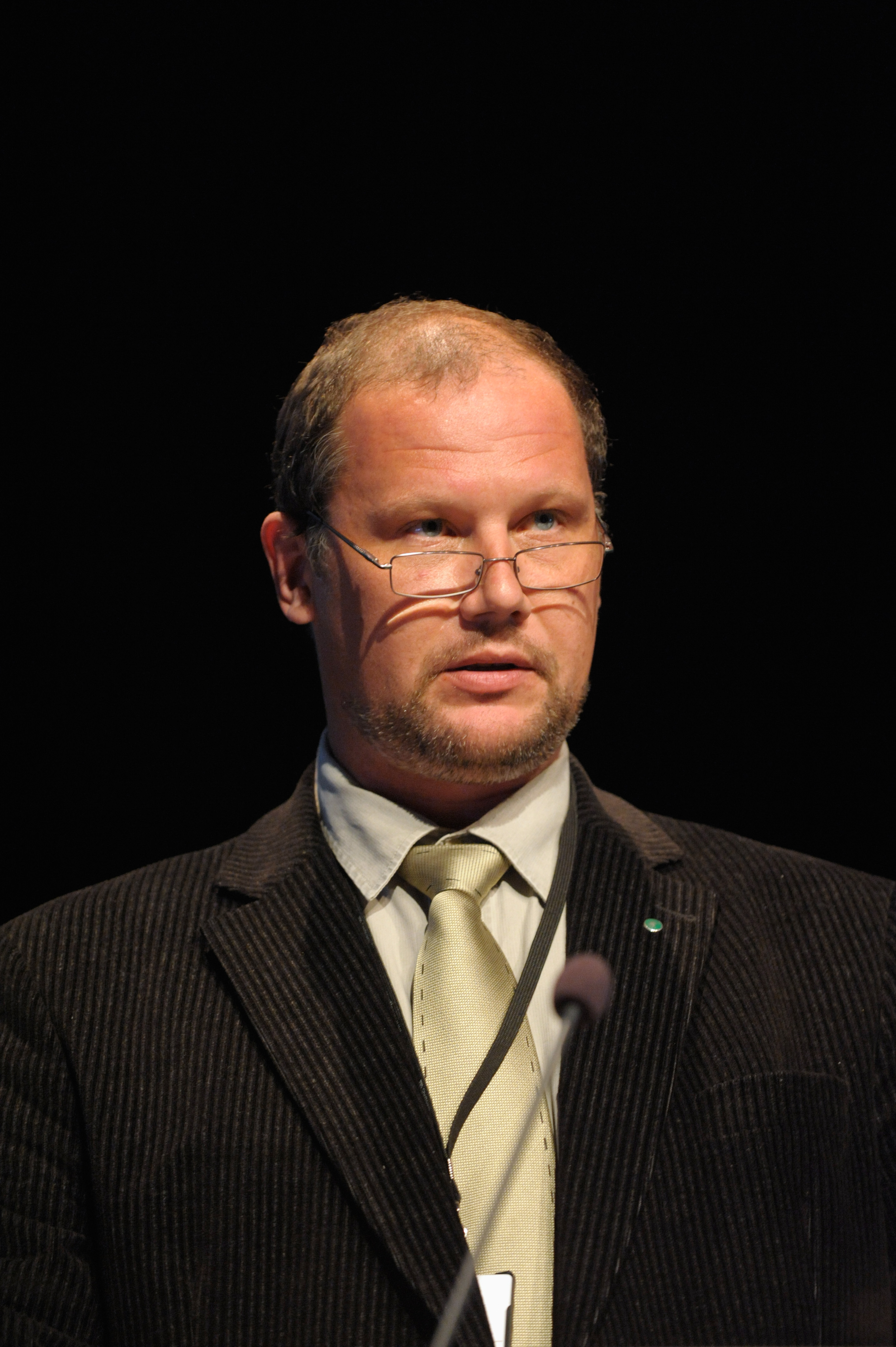 Mart Jüssi parlamentariker från Estland talar vid BSPC:s möte i Visby 2008-09-01